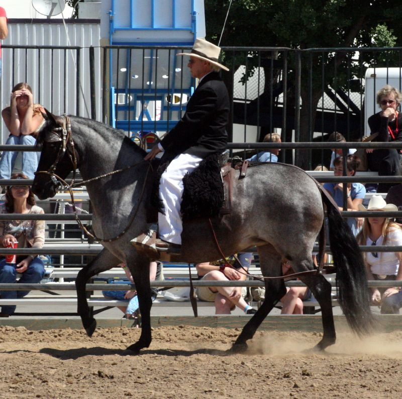 Peruvian Paso